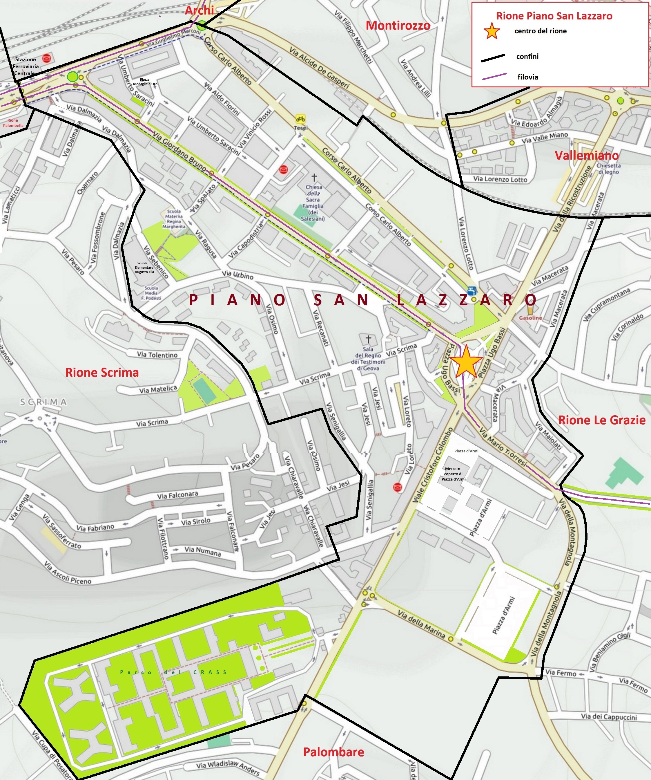 Mappa del Rione Piano San Lazzaro (detto anche semplicemente Piano) di Ancona, con i confini, le vie, le piazze e i parchi.